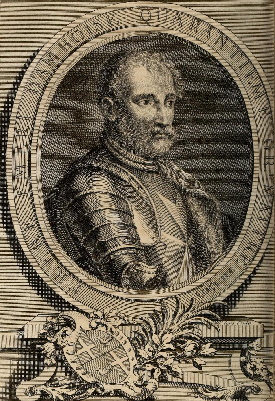 grand maître de l'ordre de Saint-Jean de Jérusalem